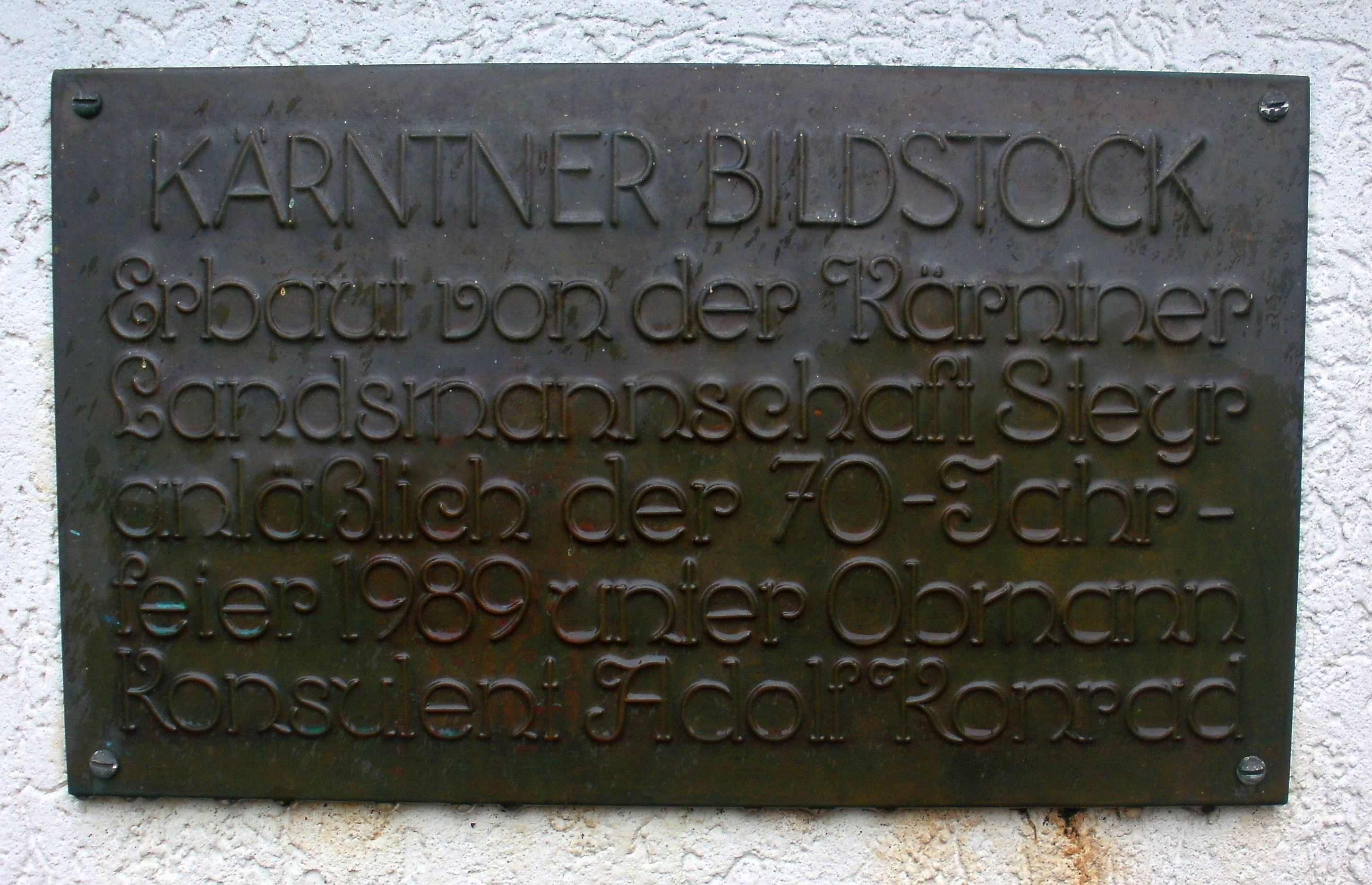 Kärntner Bildstock am Tabor, Steyr, Oberösterreich